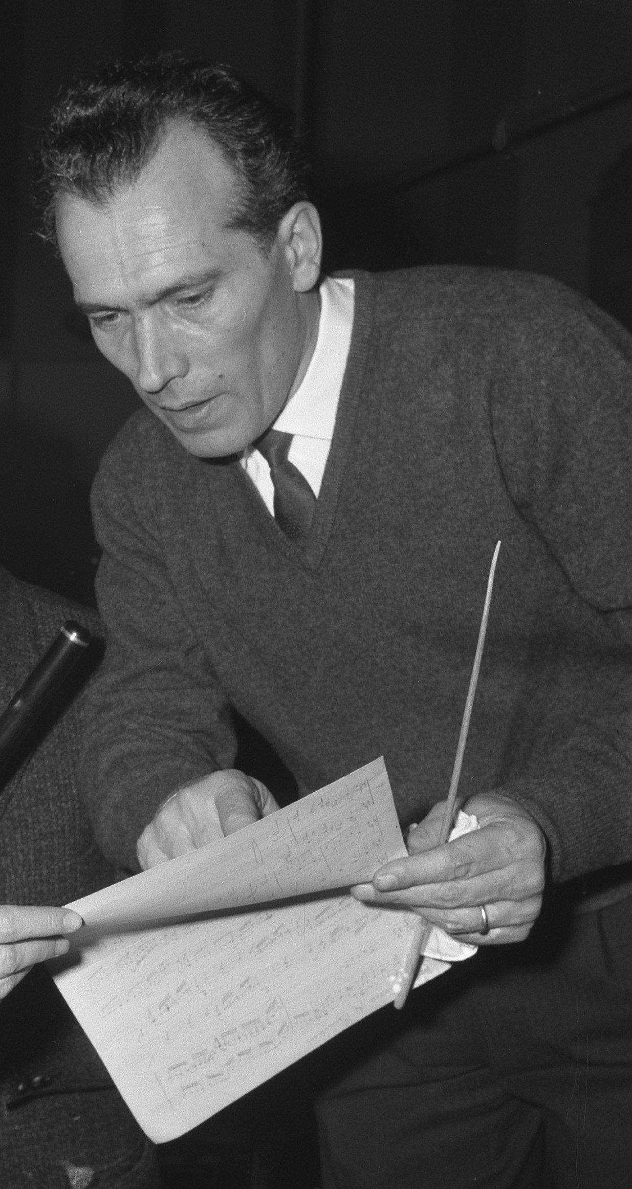 Collectie / Archief : Fotocollectie Anefo Reportage / Serie : [ onbekend ] Beschrijving : Joan Sutherland in Concertgebouw onder leiding van Fulvio Vernizzi (dirigent) Datum : 25 februari 1962 Trefwoorden : CONCERTGEBOUWEN, dirigenten Persoonsnaam : Fulvio Vernizzi, Joan Sutherland Fotograaf : Nijs, Jac. de / Anefo Auteursrechthebbende : Nationaal Archief Materiaalsoort : Negatief (zwart/wit) Nummer archiefinventaris : bekijk toegang 2.24.01.03 Bestanddeelnummer : 913-5586